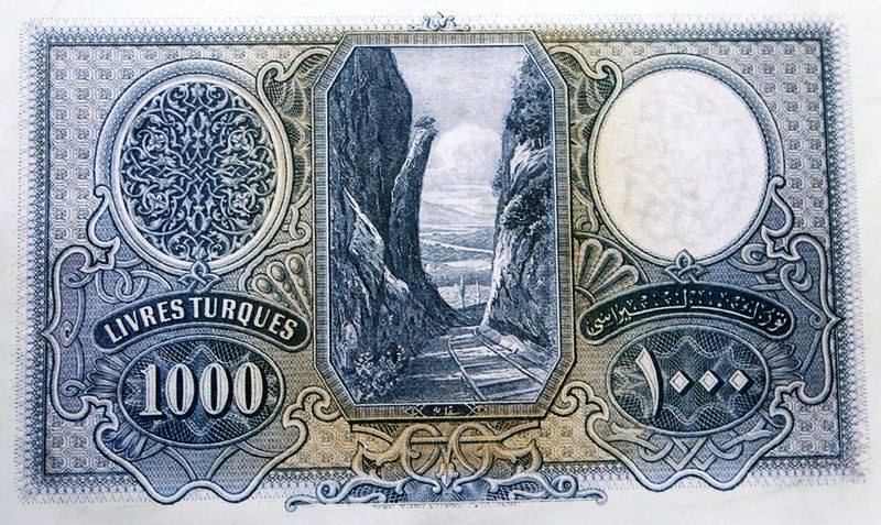 Türk Lirası üzerinde Geyve Boğazı